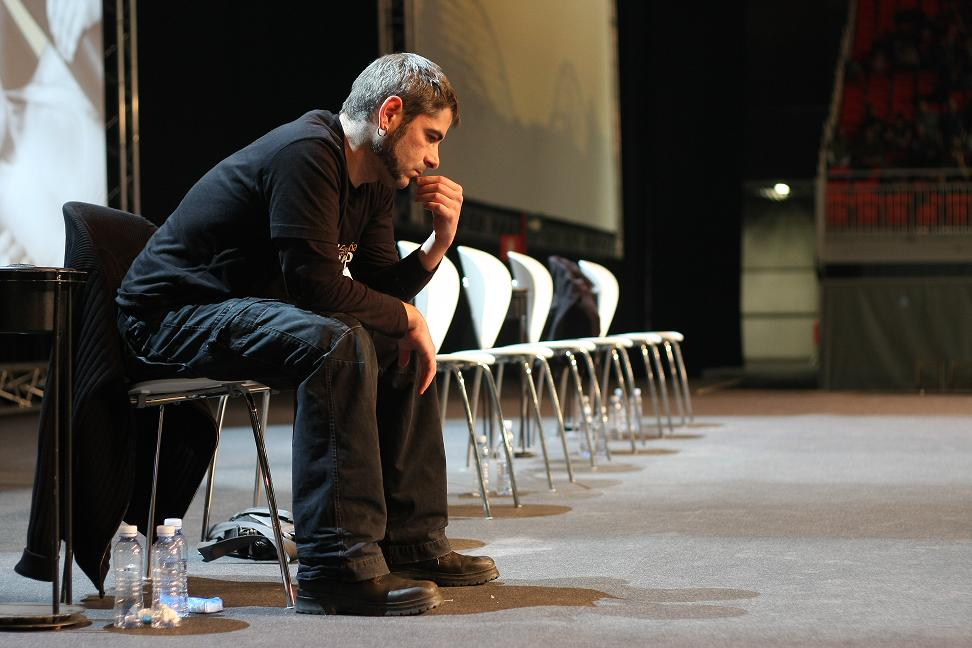 Unai Iturriaga kartzelatik bueltan Bertsolari Txapelketa Nagusia 2009